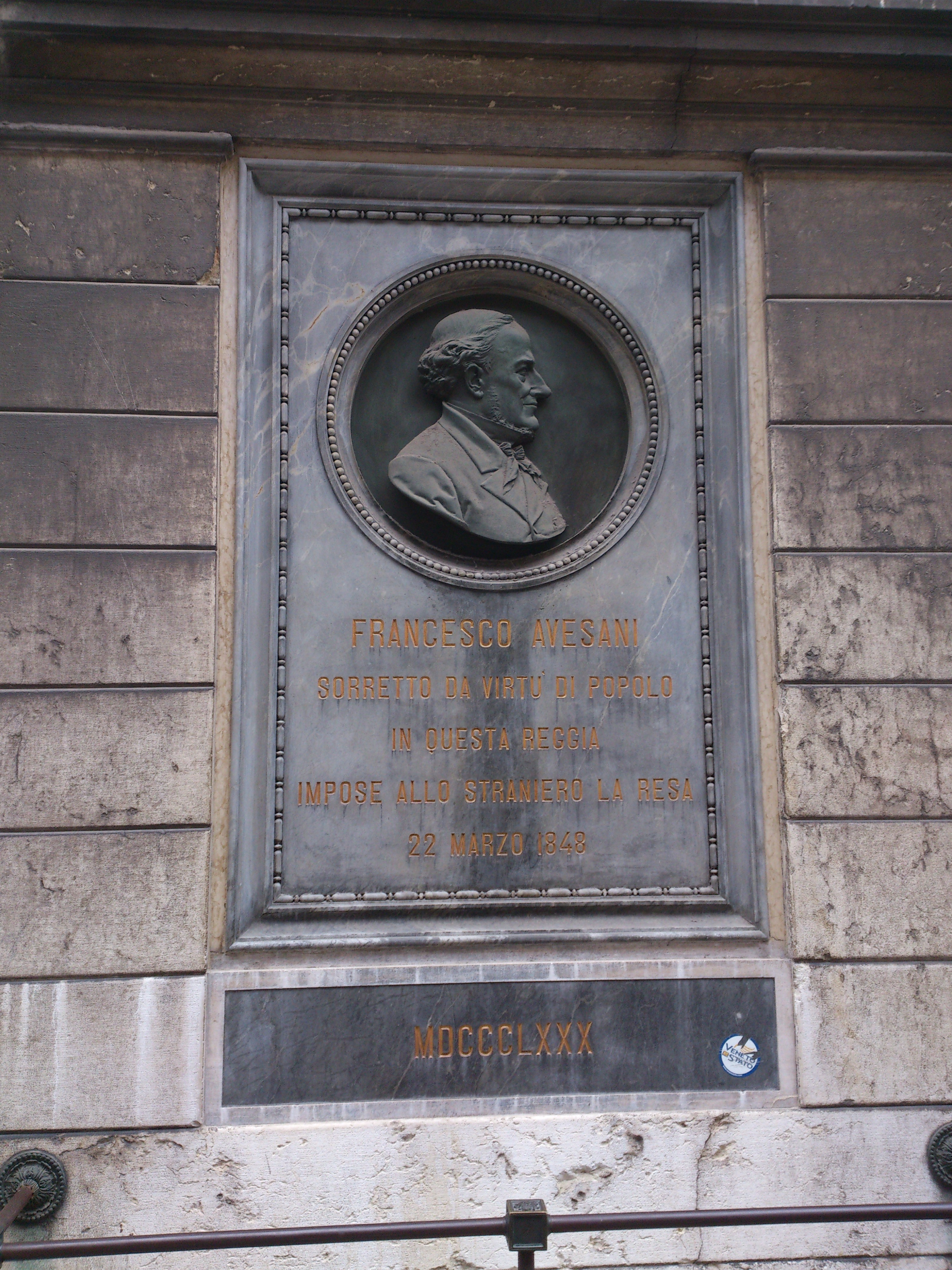 Giovanni Francesco Avesani, Венеција.